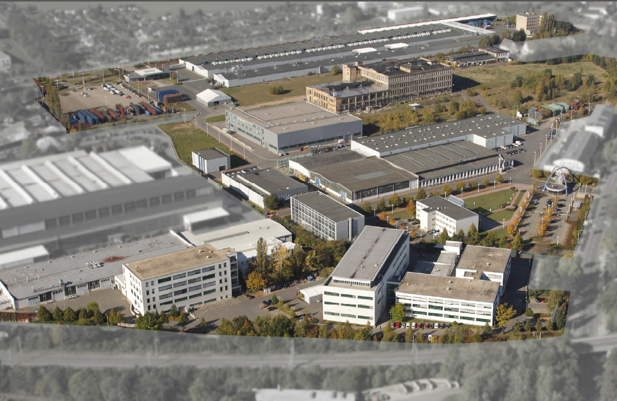 Luftaufnahme der FES GmbH Fahrzeug-Entwicklung Sachsen / Auto-Entwicklungsring Sachsen GmbH in Zwickau